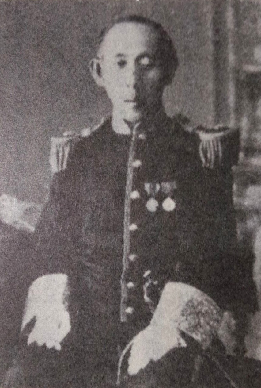 大久保忠礼の肖像写真。